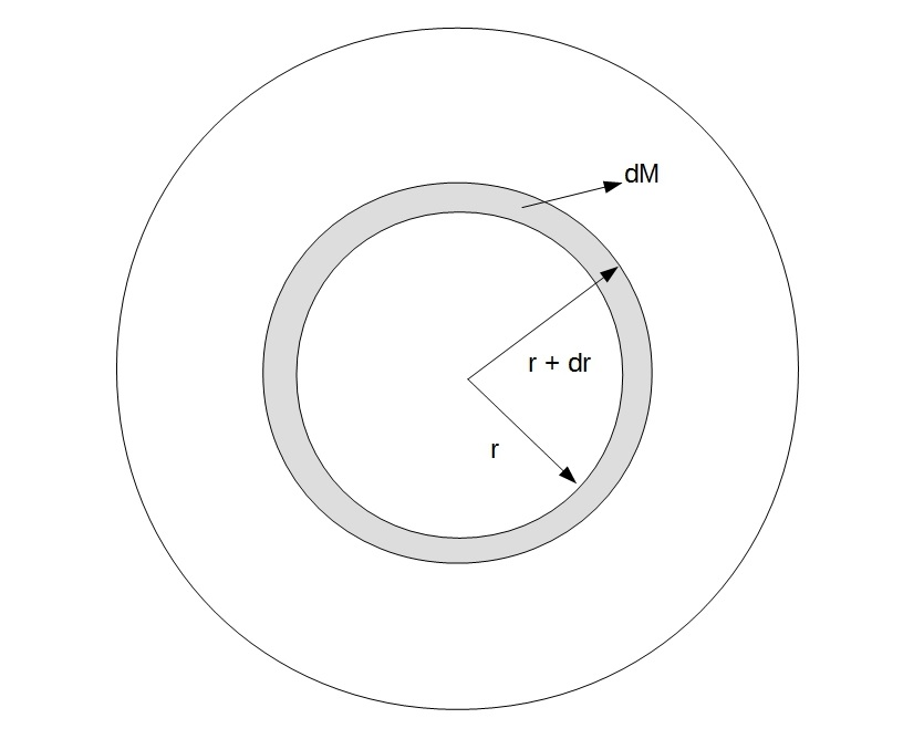 Esquema que muestra un cascarón esférico delgado de pruebas, con un radio dr y masa dM, dentro de una estrella. Adaptado de: LeBlanc, F.; "An Introduction to Stellar Astrophysics"; John Wiley & Sons; 2010.